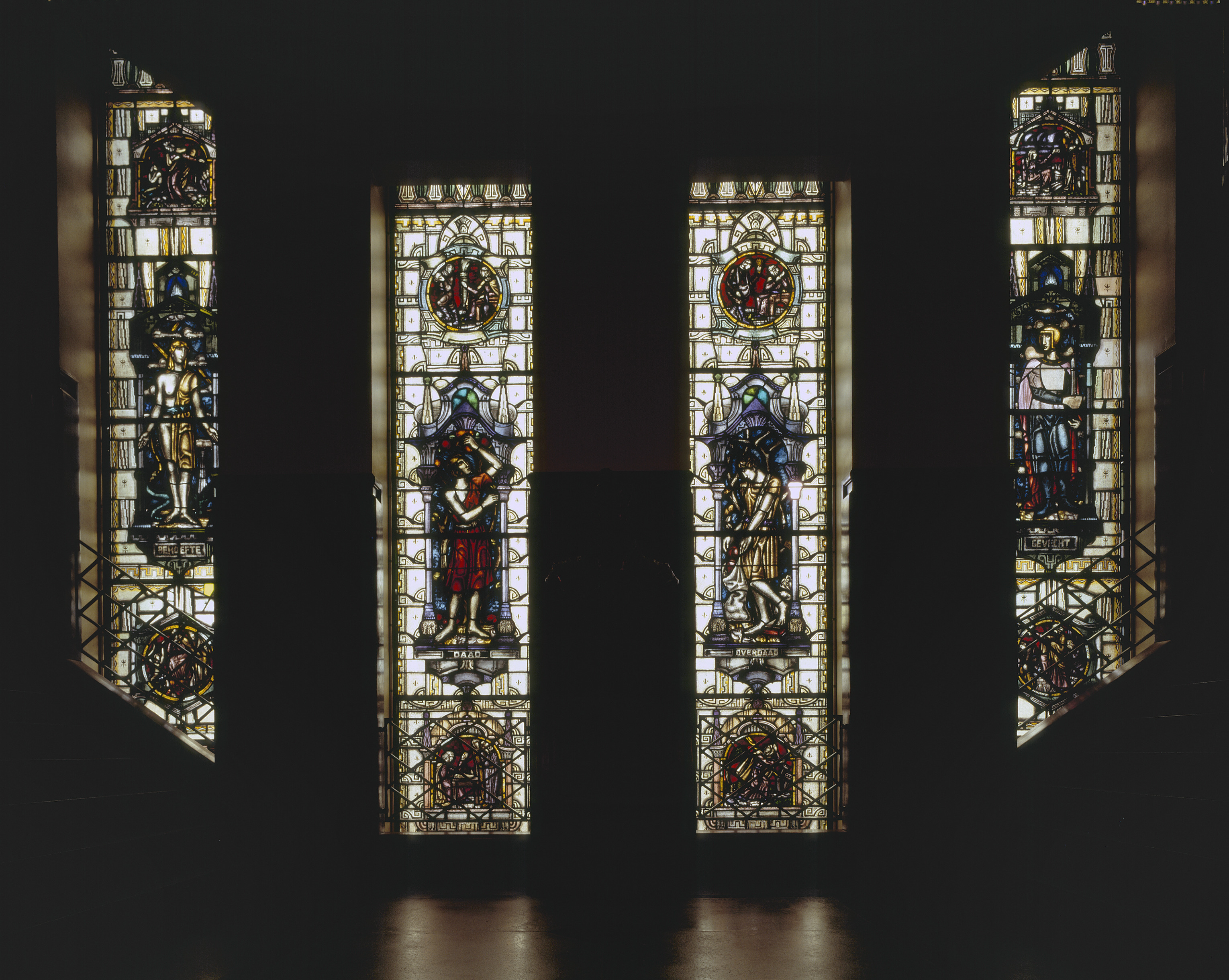 Voormalige Nederlandsche Handelmaatschappij: Interieur, aanzicht gebrandschilderde glas-in-loodramen. Ontwerp: Antoon Derkinderen. Uitvoering: Joep Nicolas. (opmerking: Gefotografeerd voor Glas in lood in Nederland 1817-1968)